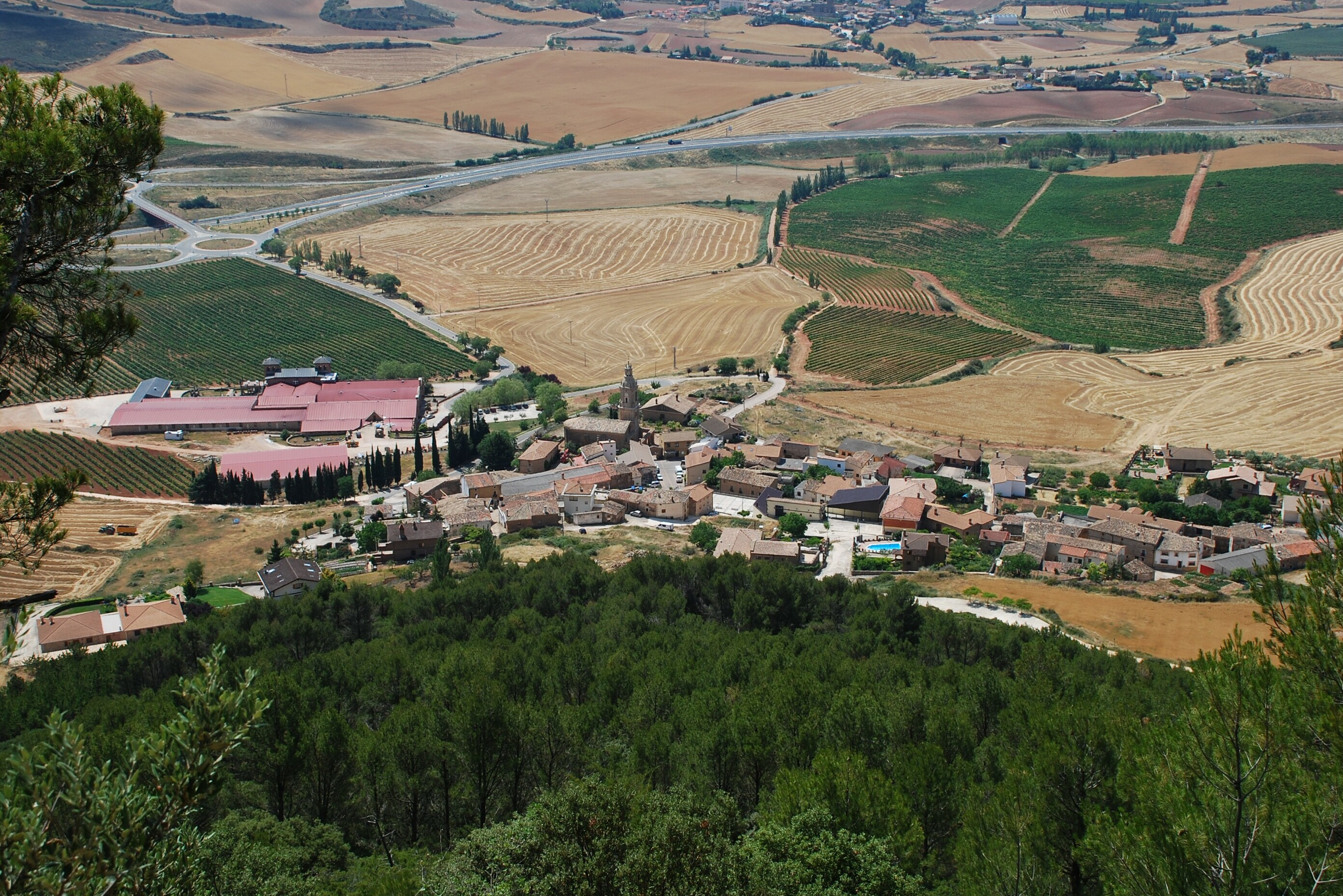 Villamayor de Monjardín (Navarra, España)